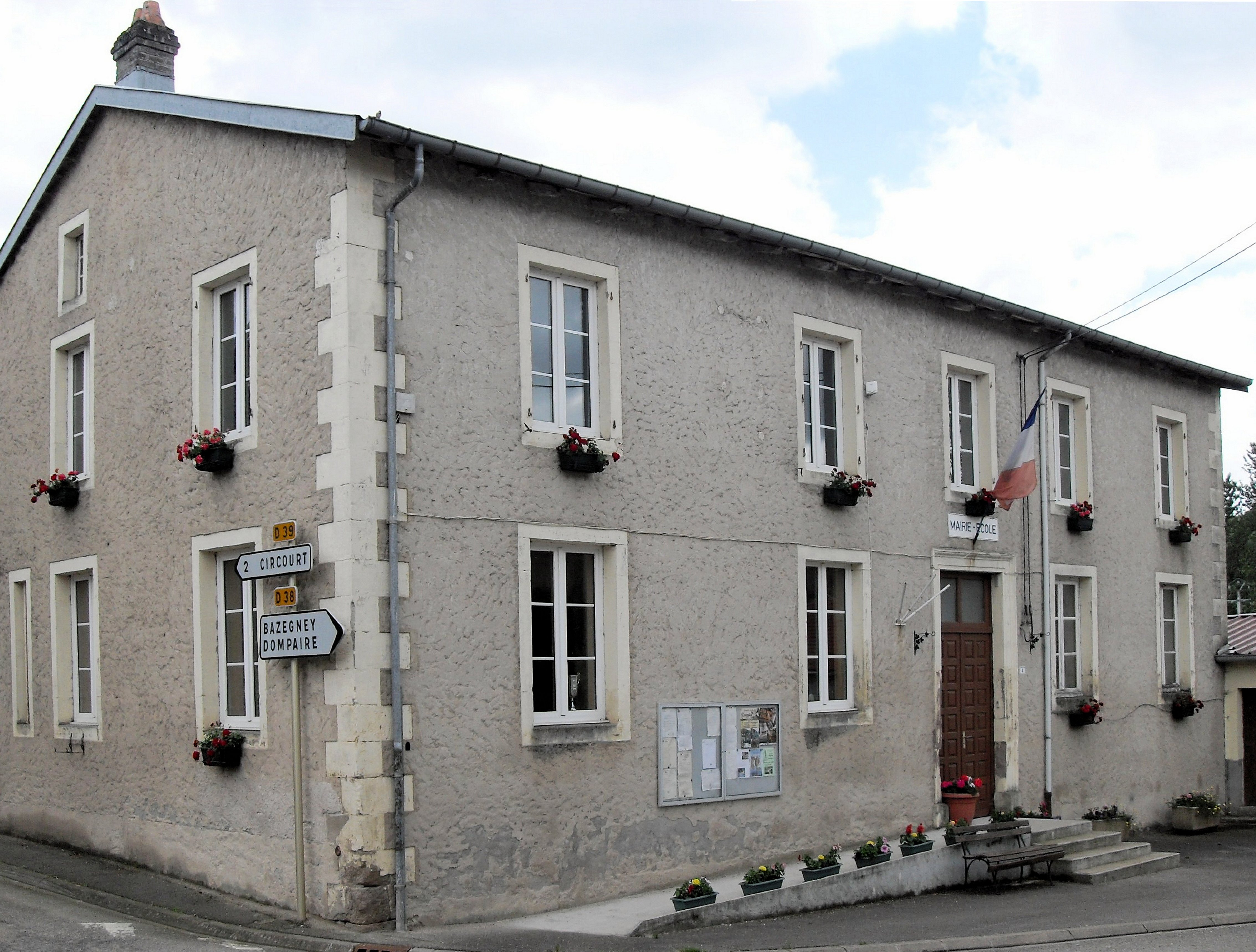 La mairie-école de Derbamont